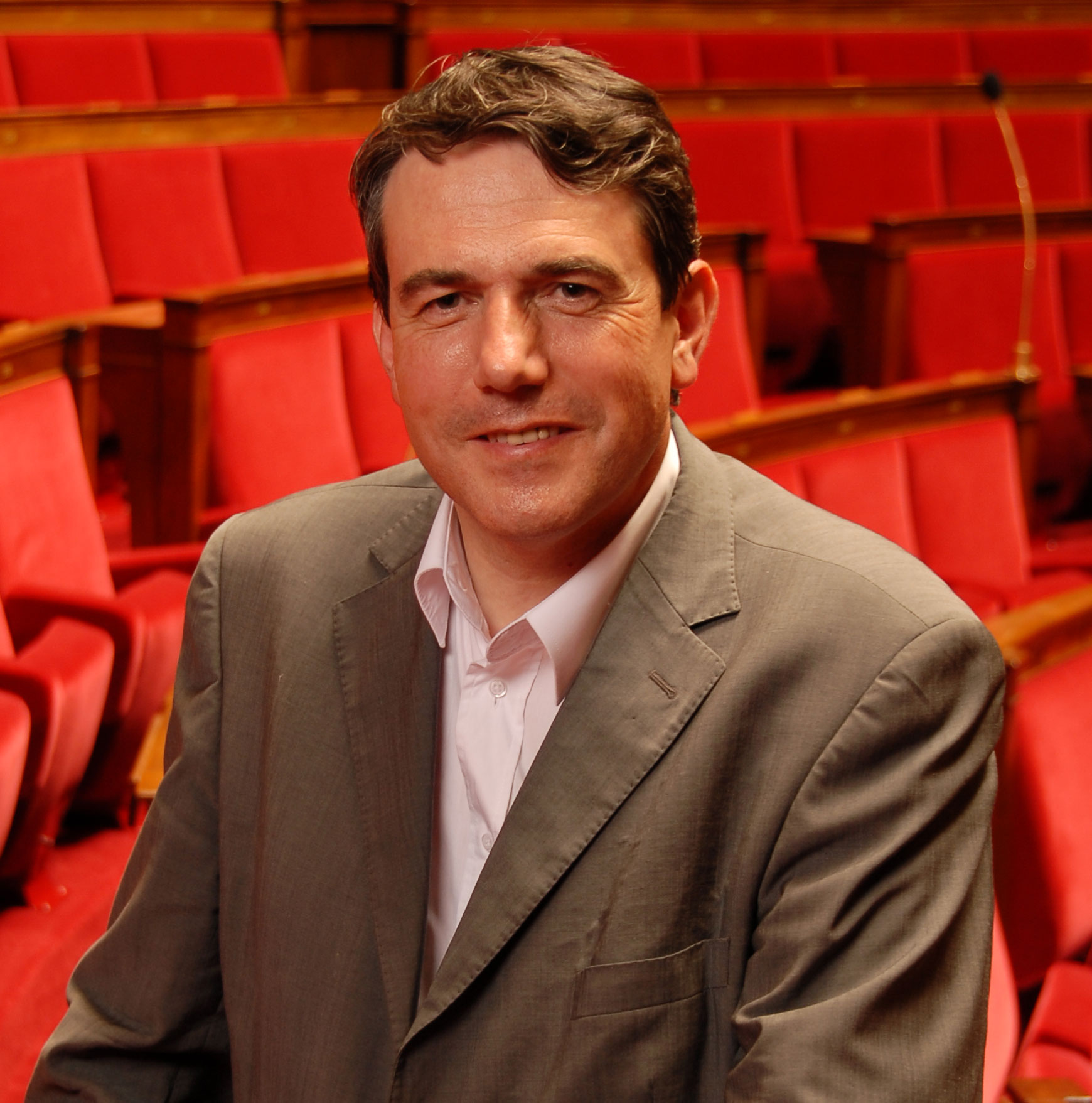 Première photo à l'Assemblée nationale Ænglisc: First picture in French Parliament